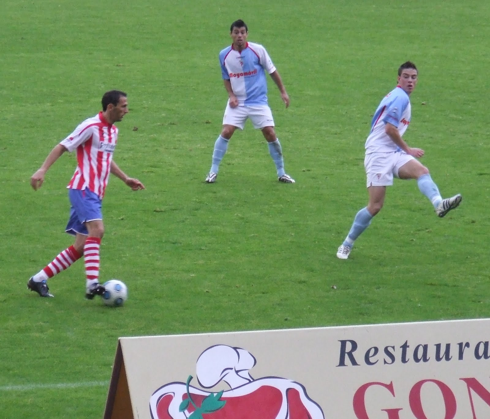 Partido de Segunda "B" entre la Sociedad Deportiva Compostela y el Club Deportivo Lugo correspondiente a la temporada 2009-10.